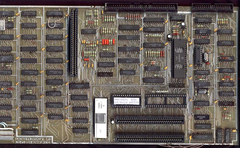 Фотоснимок главной платы компьютера Pentagon 1024 SL.